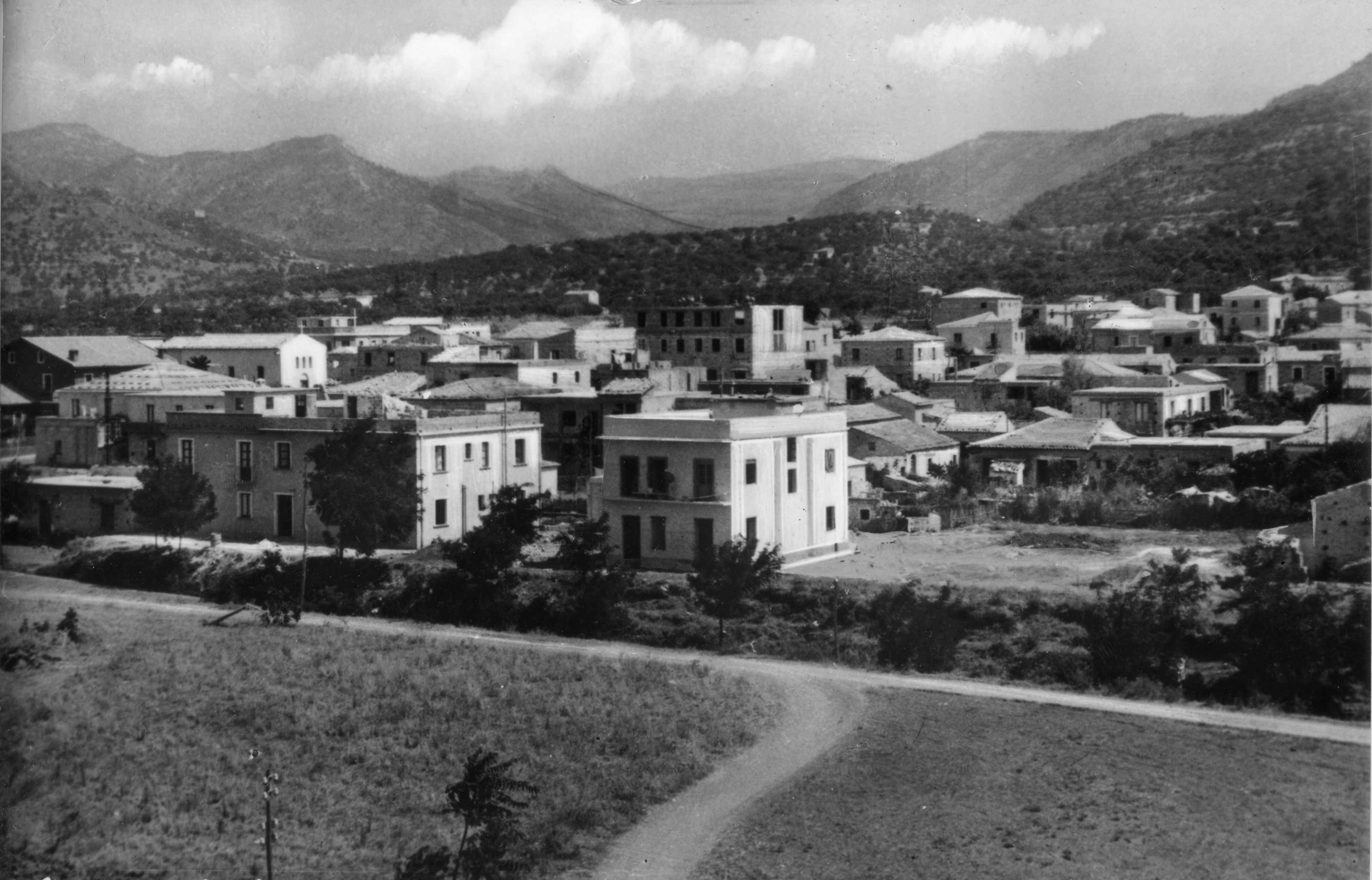 Panorama di Campora San Giovanni negli anni 60 vista dal mare in aereo